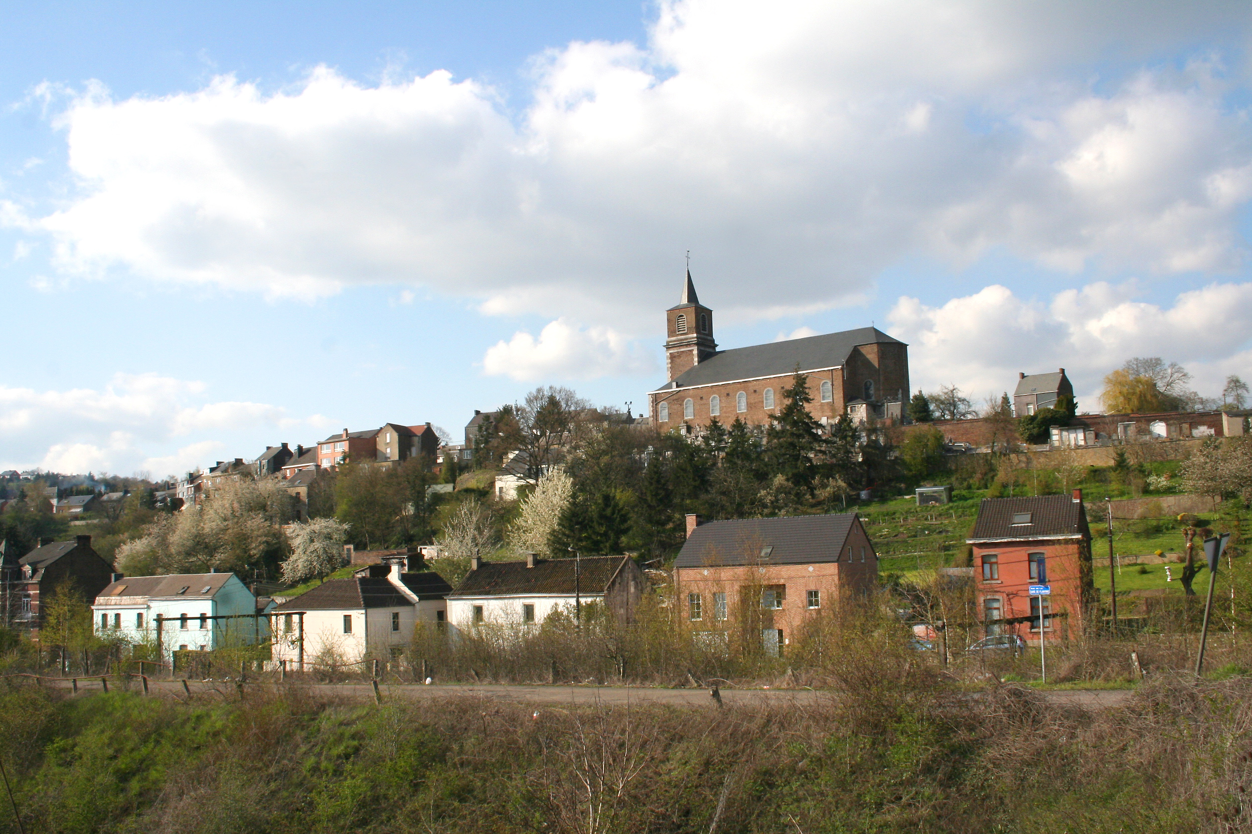 Flawinne, le quartier de l'église Notre-Dame de l'Assomption (1841-1843).